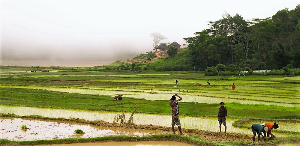 Reisfelder in Seloi Malere, Aileu.